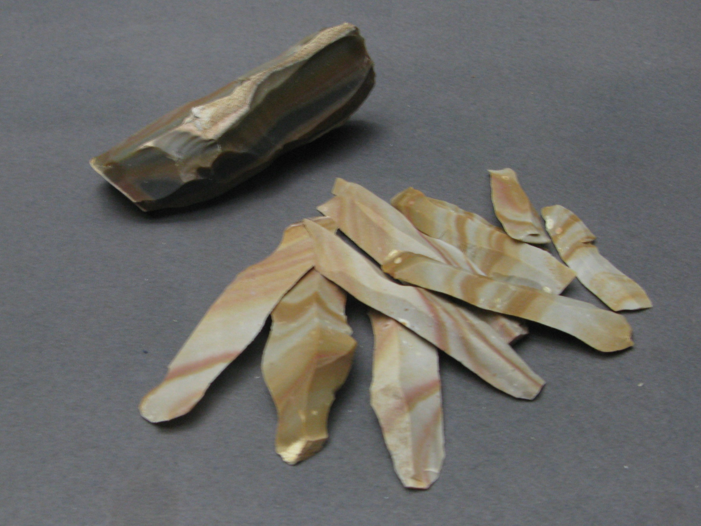 Expérimentations de François Bordes exposées au musée d'Aquitaine.